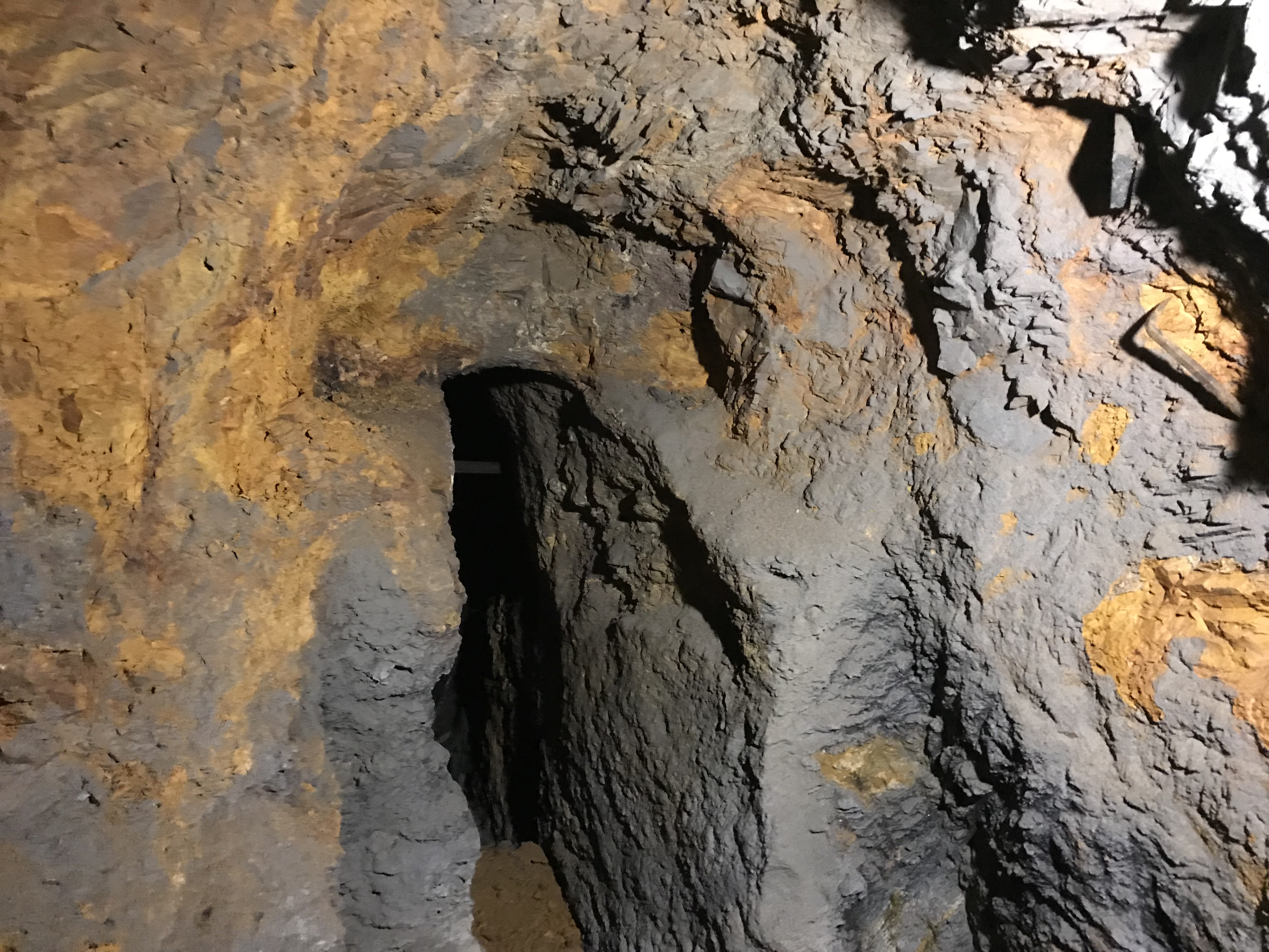 Stollen im Berkwerk